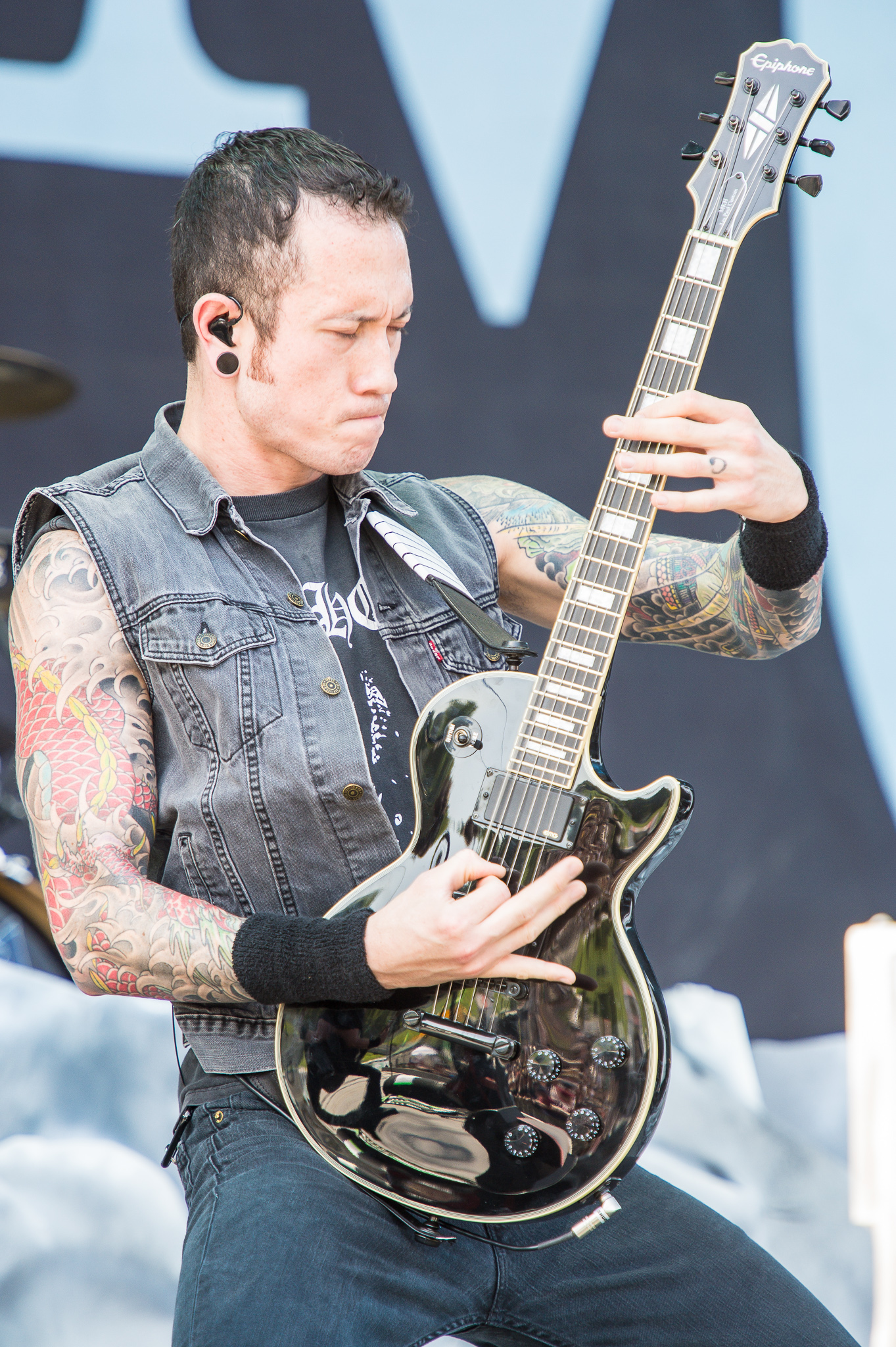 ARGO-Konzerte,Centerstage,Konzert,Livekonzert,Livemusik,Matthew Heafy,Musik,RiP,Rock im Park 2014,Trivium